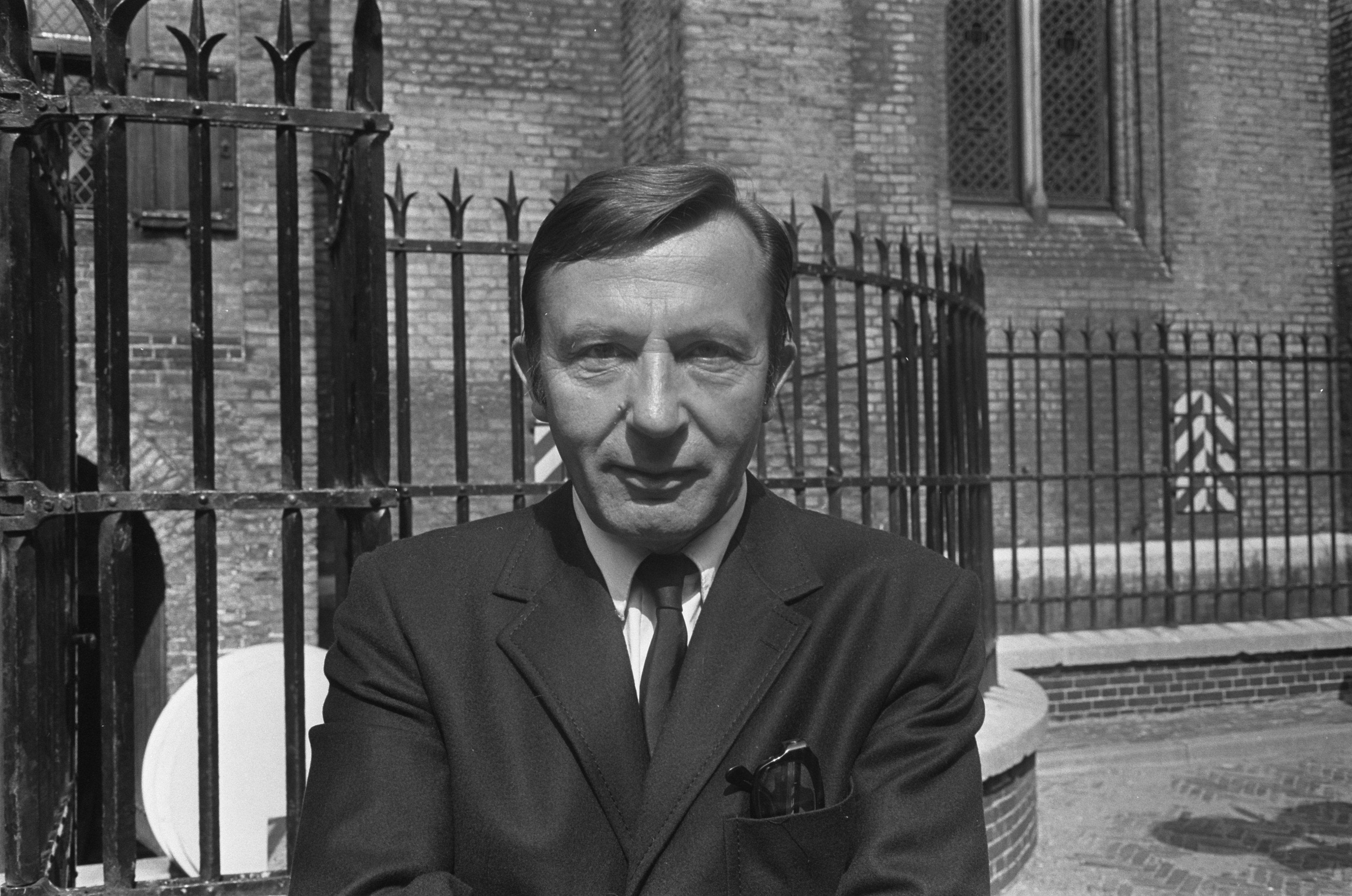 Intern. Congres Transplantatie in Den Haag prof. dr.J.J. van Loghem, hoogleraar immunopathologie Universiteit Amsterdam